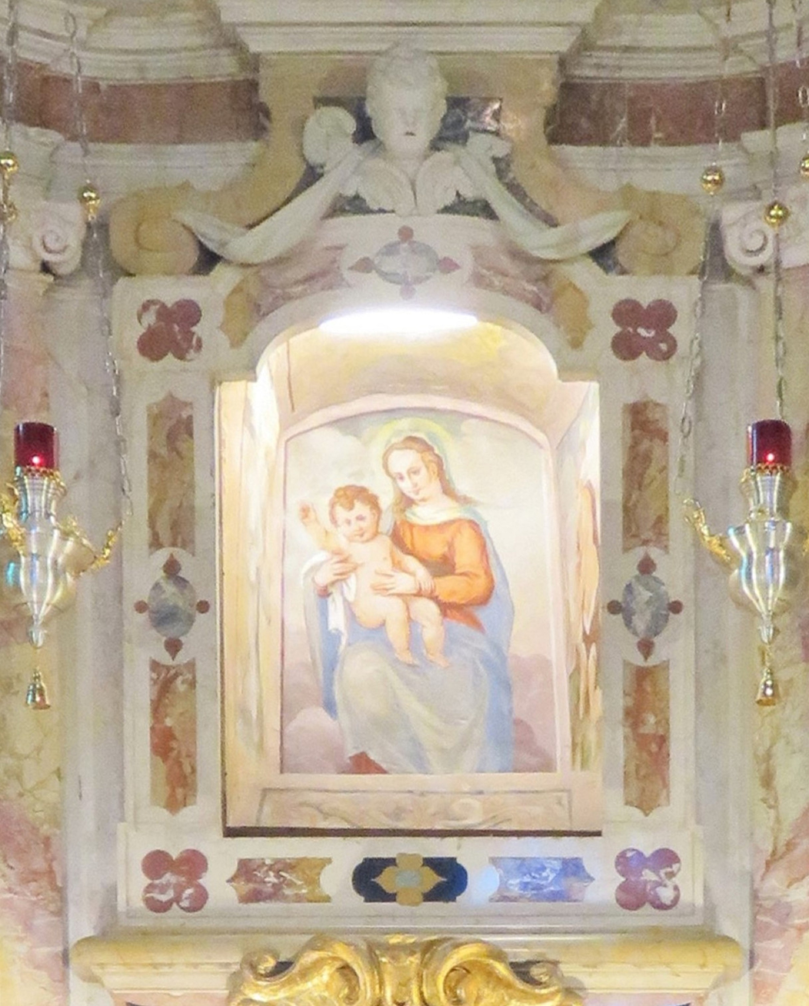 Altare maggiore, particolare. Madonna con Bambino, antico tabernacolo ora inserito nell'altare